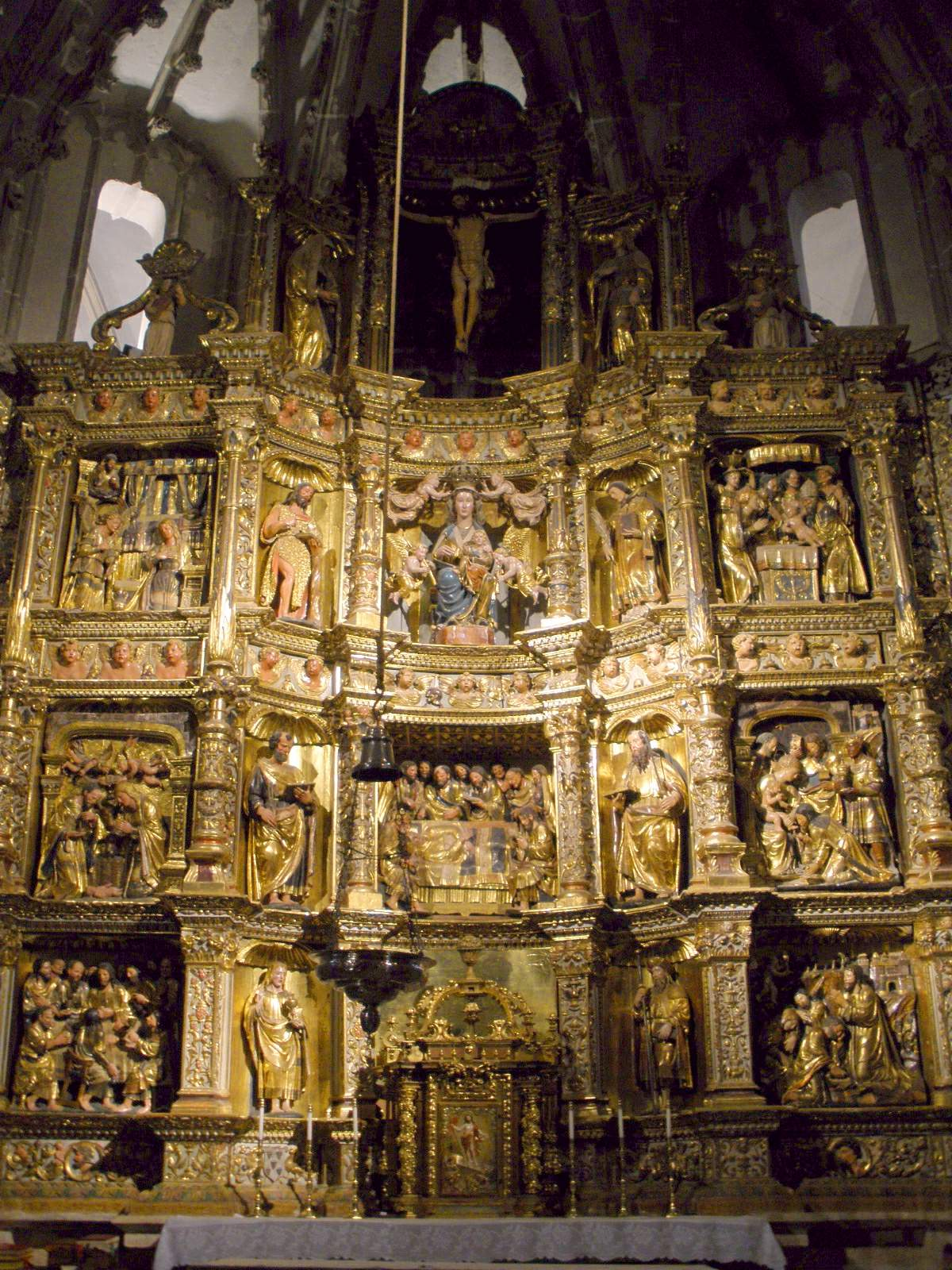 Capilla del Sagrario, Catedral de Palencia